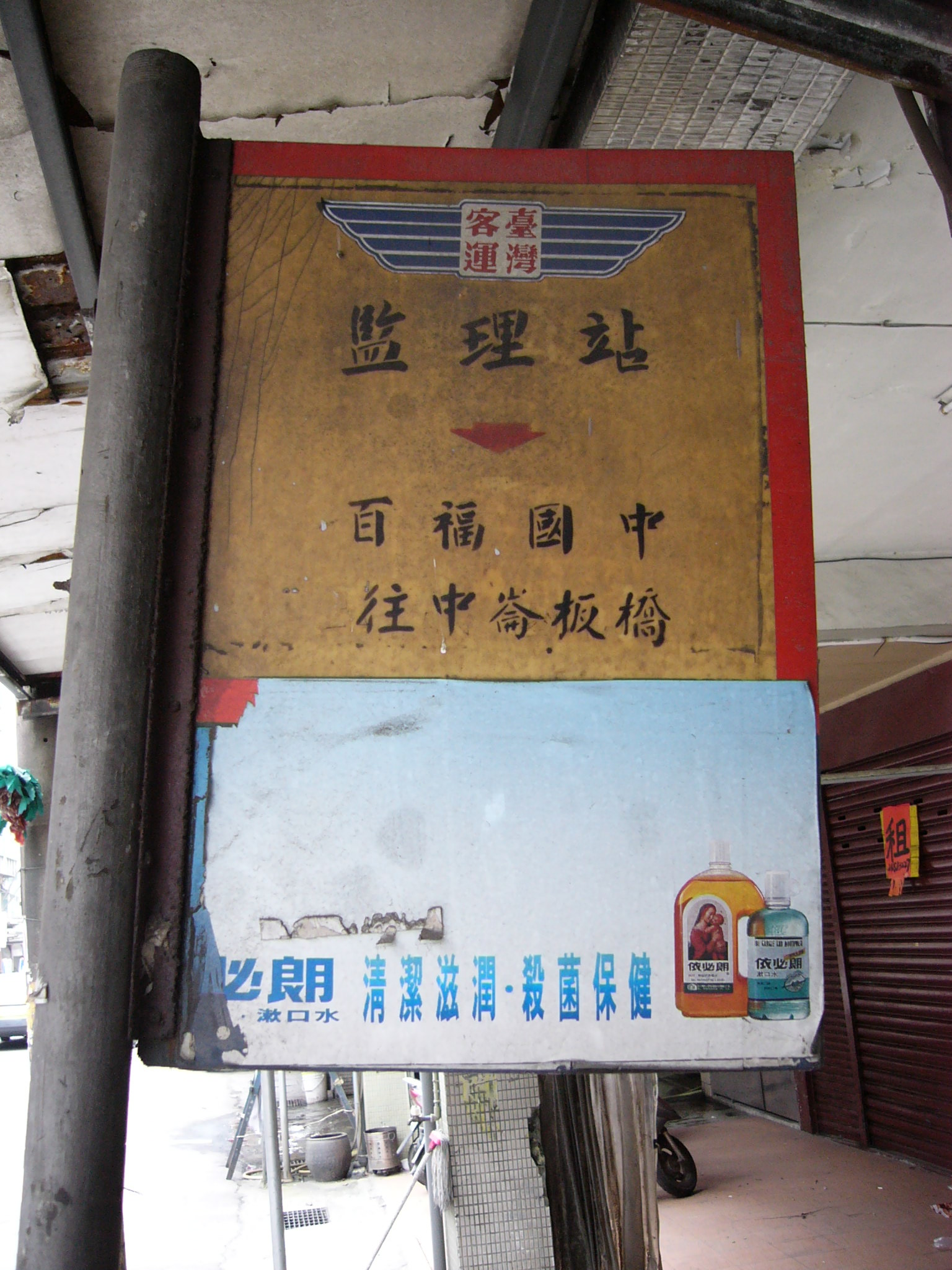 臺灣汽車客運公司第一代商標時期「監理站」站牌，位於基隆市七堵區福五街交通部公路總局基隆監理站附近，2014年1月時已經被拆除。